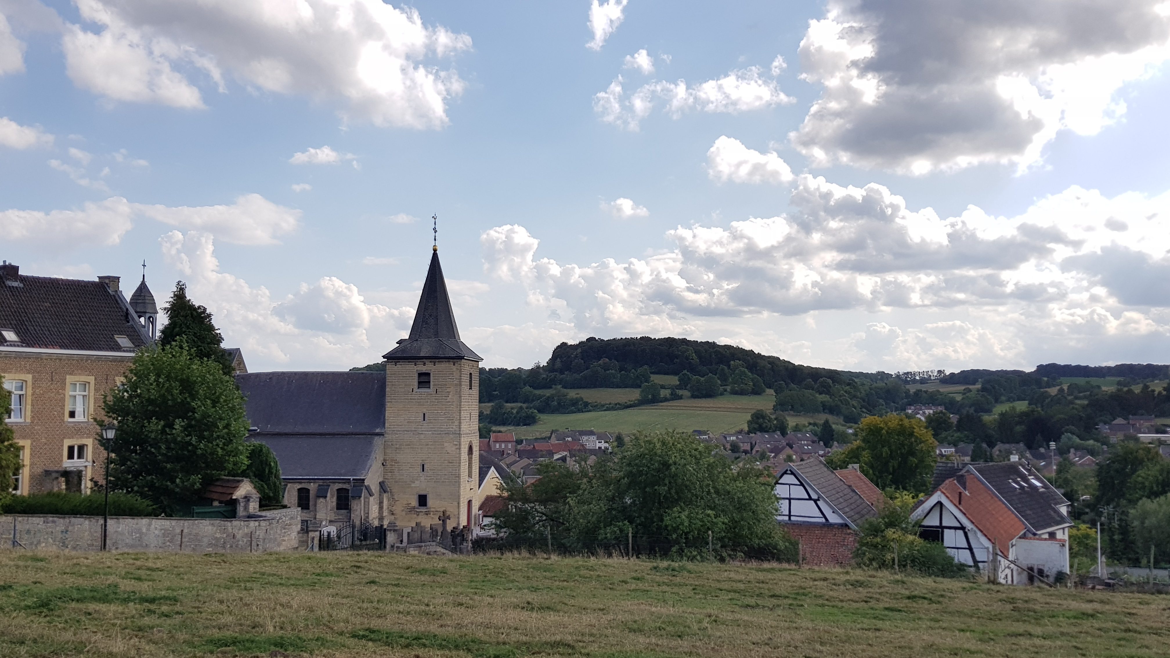 Sousberg gezien vanuit het noorden vanaf het station Schin op Geul, Schin op Geul, Nederland